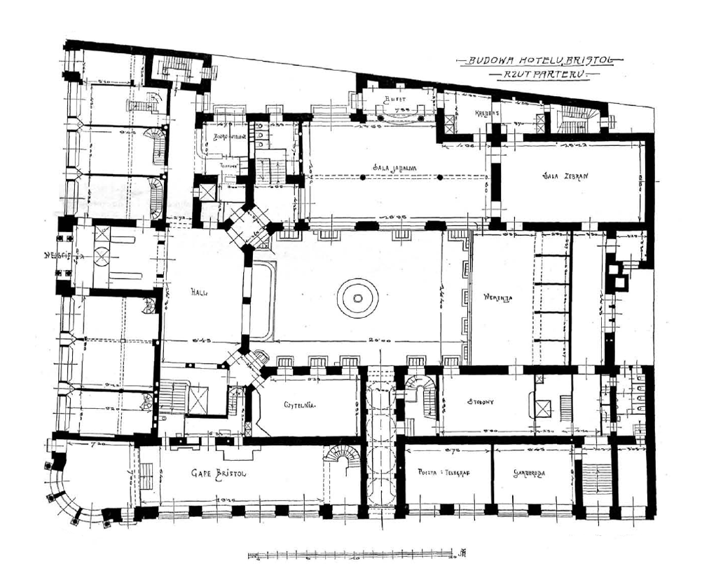 Готель "Брістоль" у Варшаві. Архітектор Владислав Марконі.